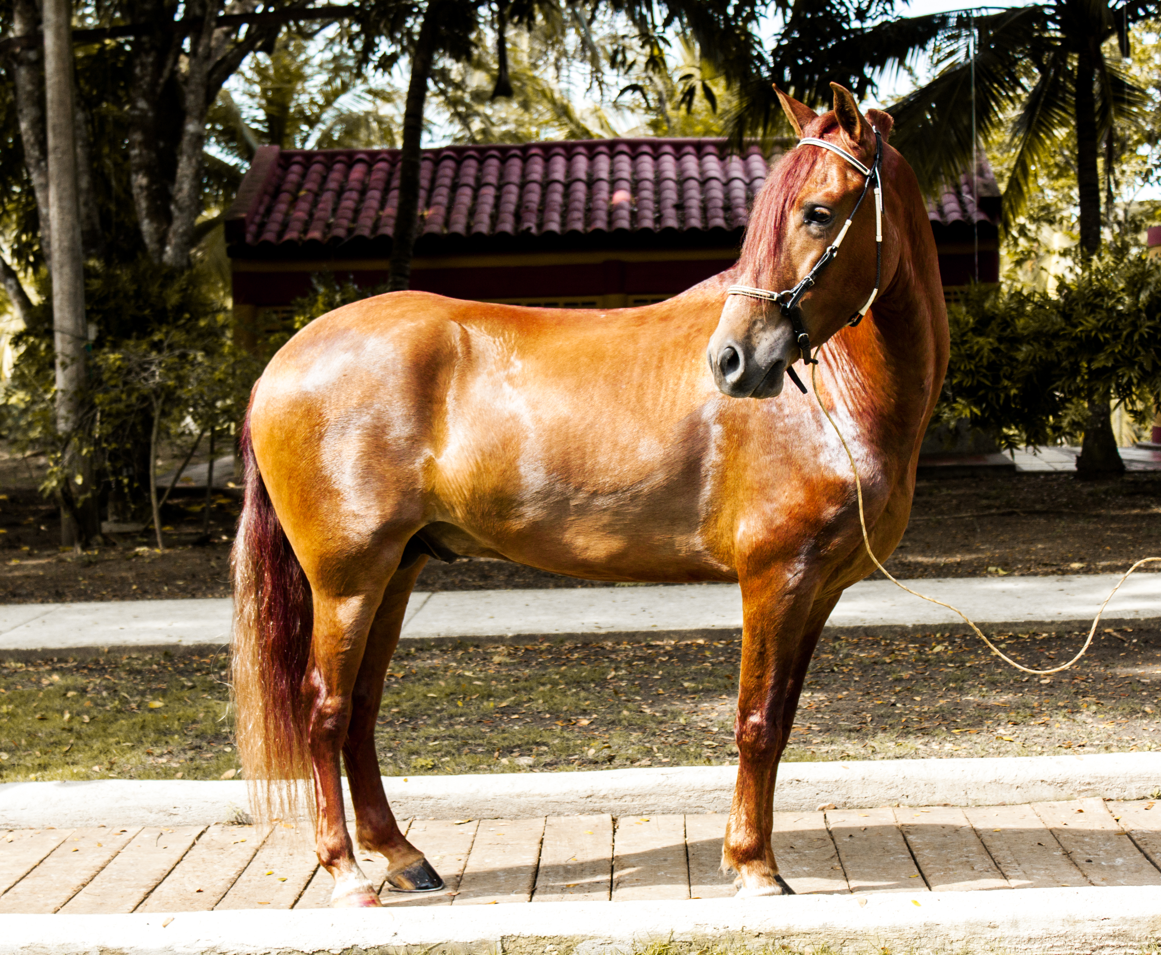 caballo criollo colombiano, trochador galopero